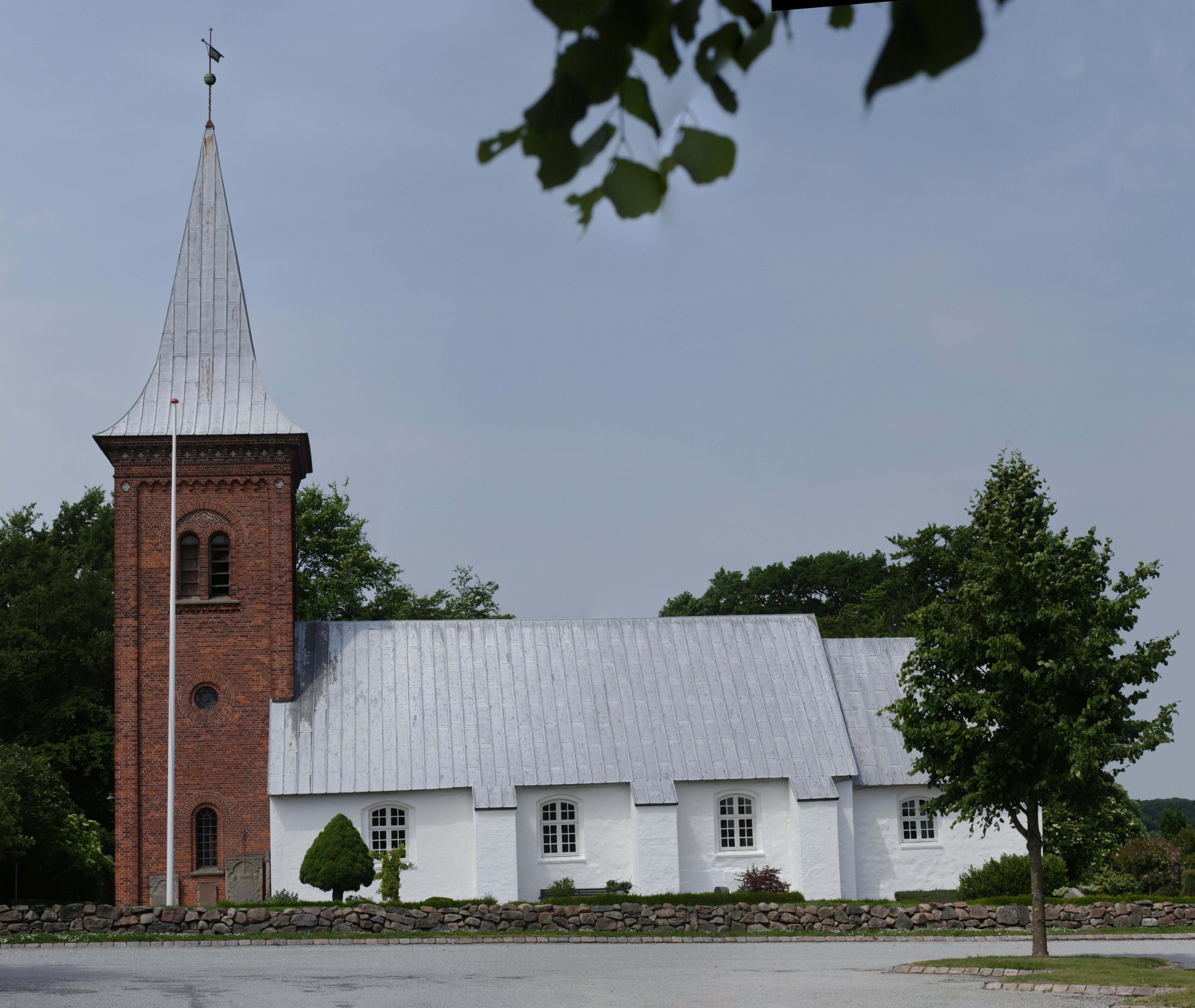 Fårup Kirke, Århus kommune